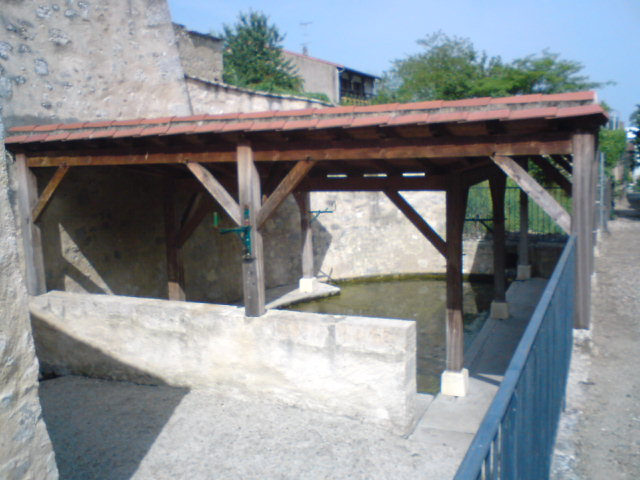 Lavoir de Layrac